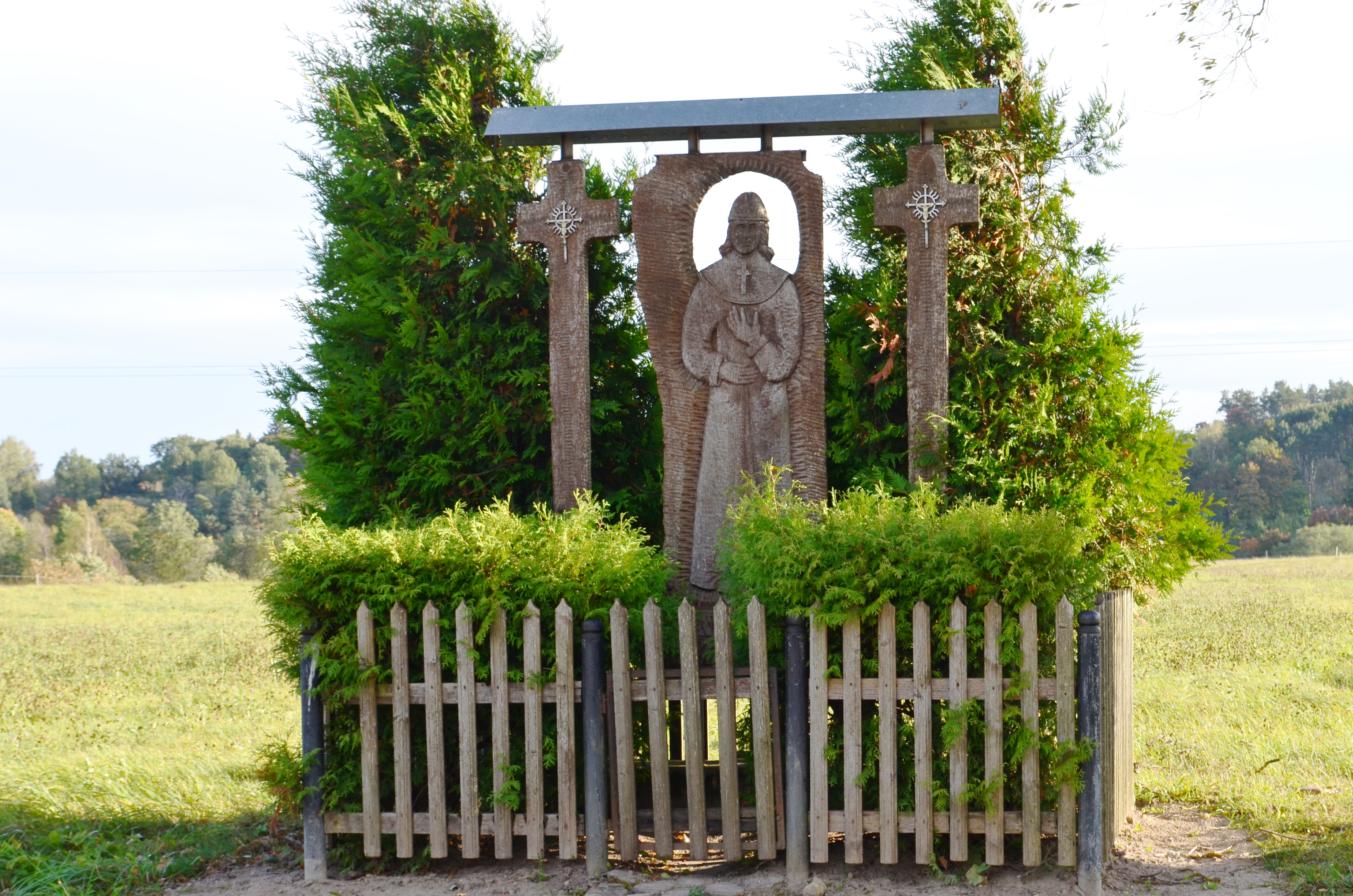 Gedminiškė, Šilalės raj.